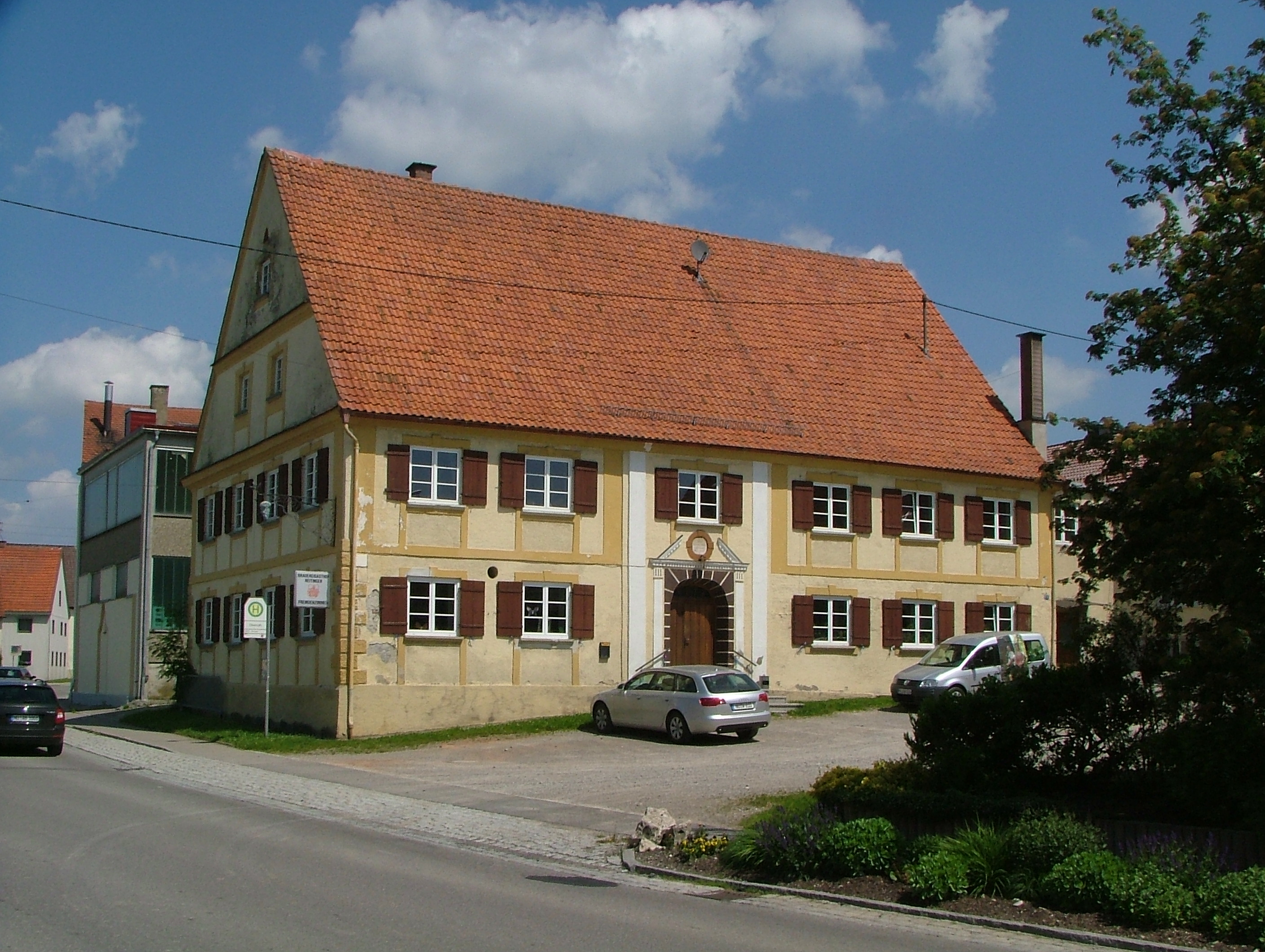 Oberroth Gasthof frühklassizistisch